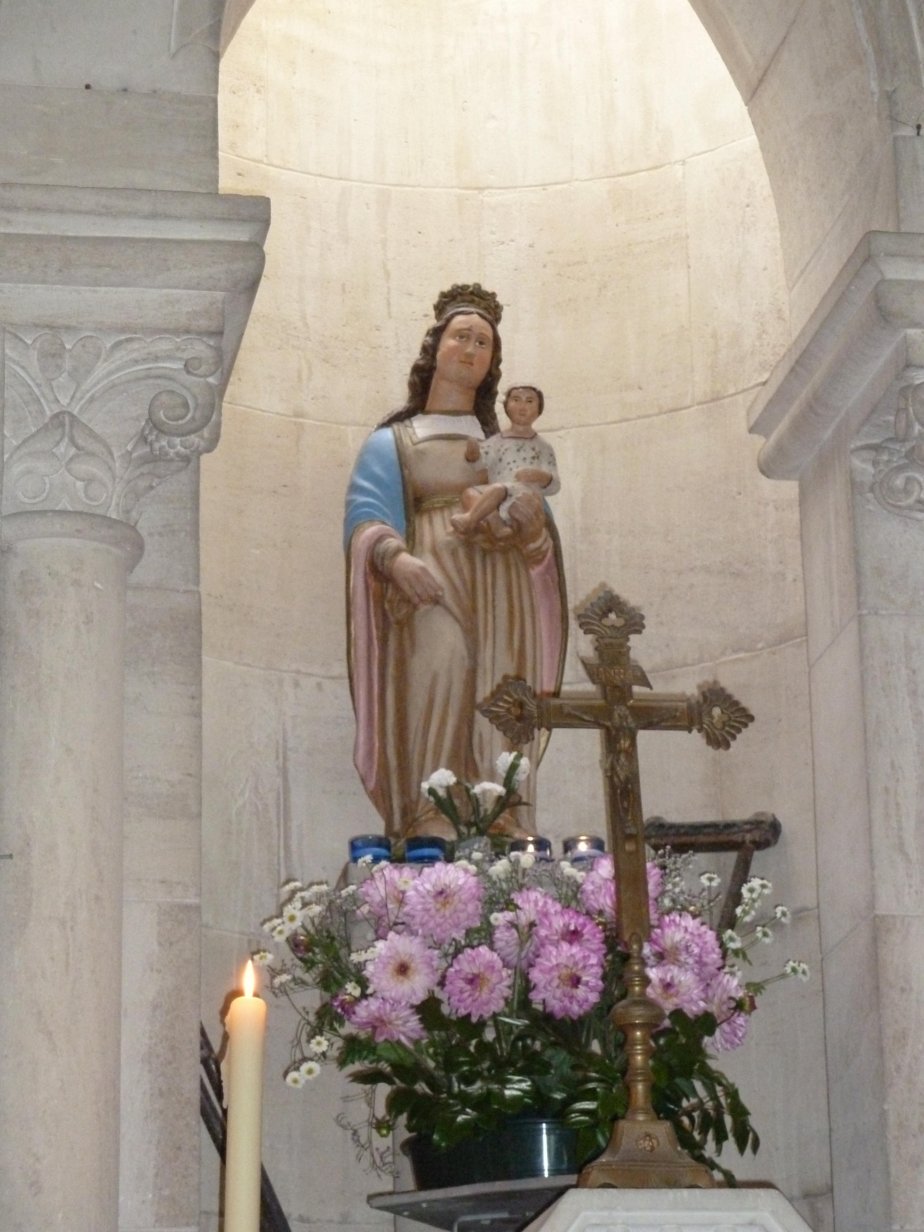 Jouy-sous-les-Côtes (Meuse) - Notre-Dame de Jévaux - la statue de la Vierge à l'enfant